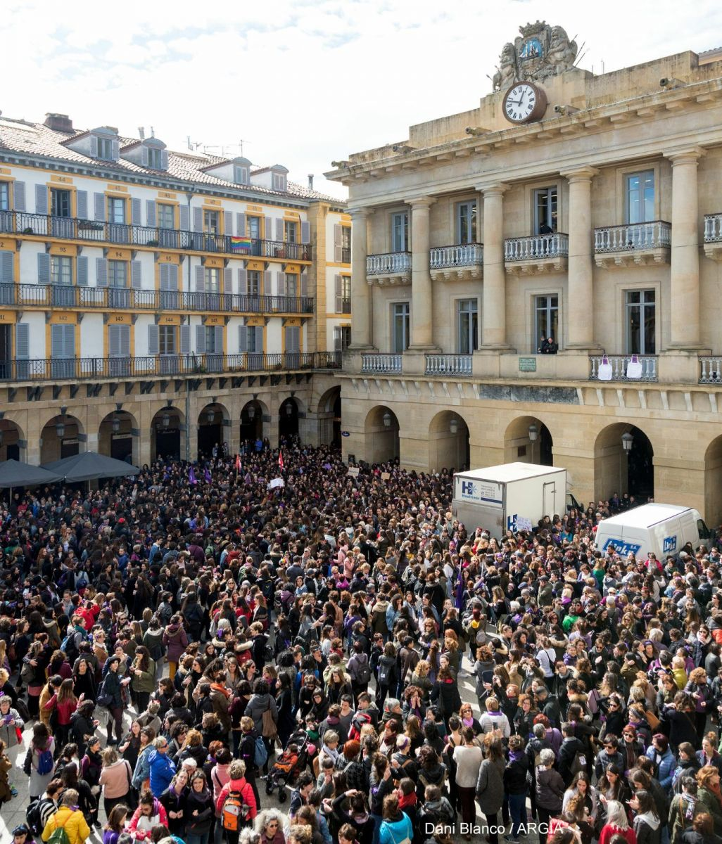 2018ko martxoak 8ko greba feminista - Donostia